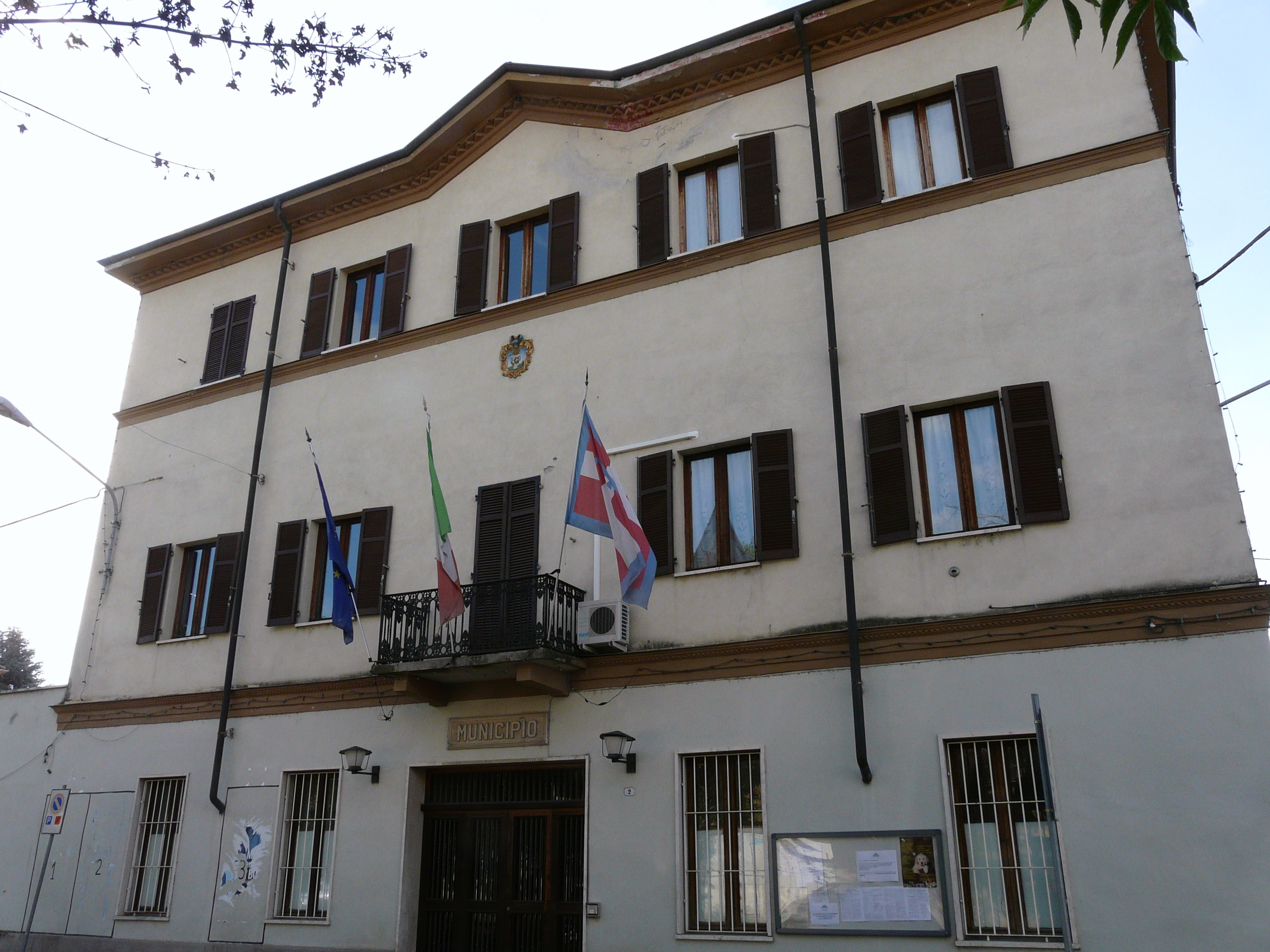 Municipio di Frugarolo, Piemonte, Italia.